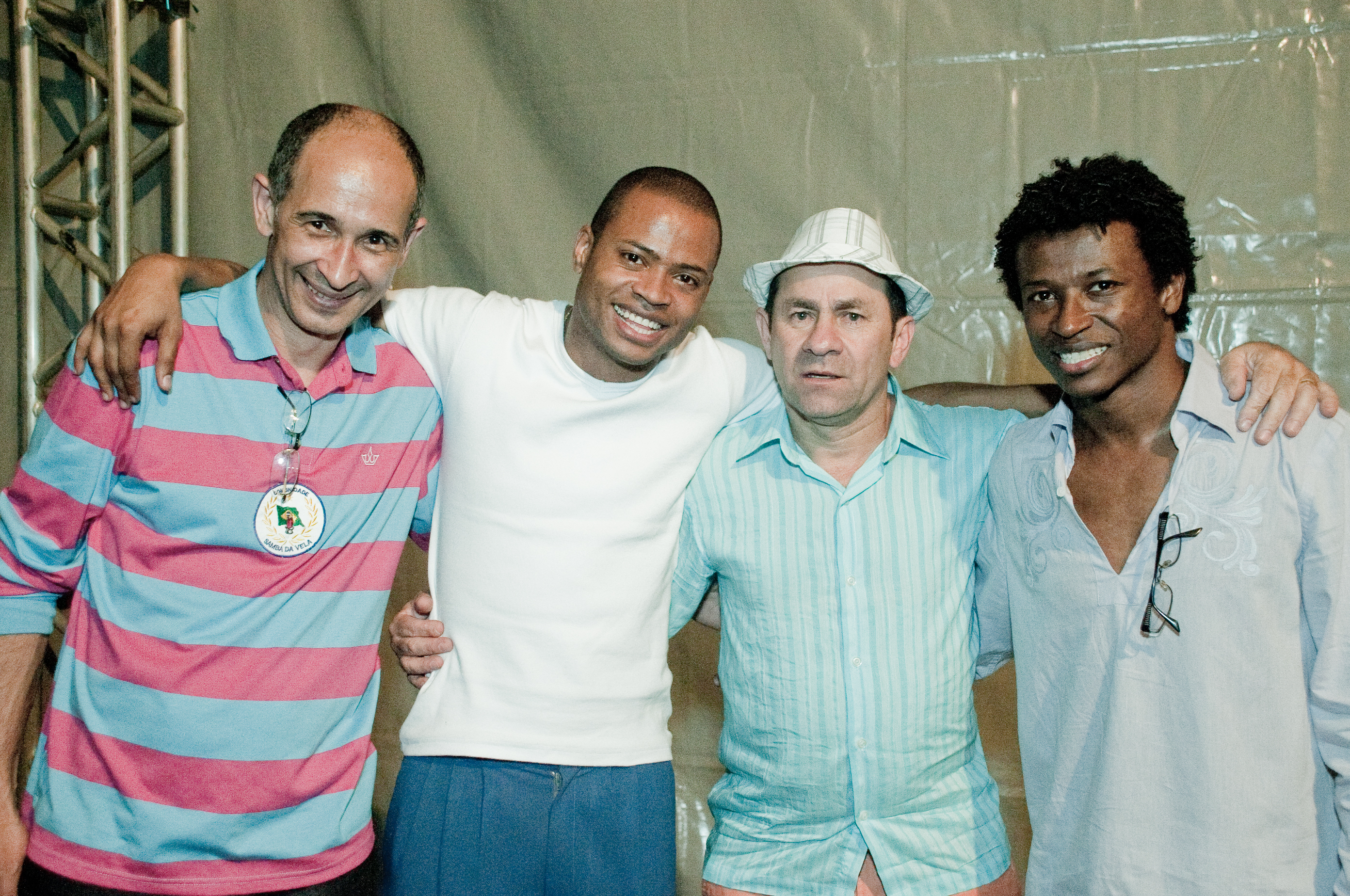 Paquera - Maurilio de Oliveira - Chapinha - Magnu Sousá